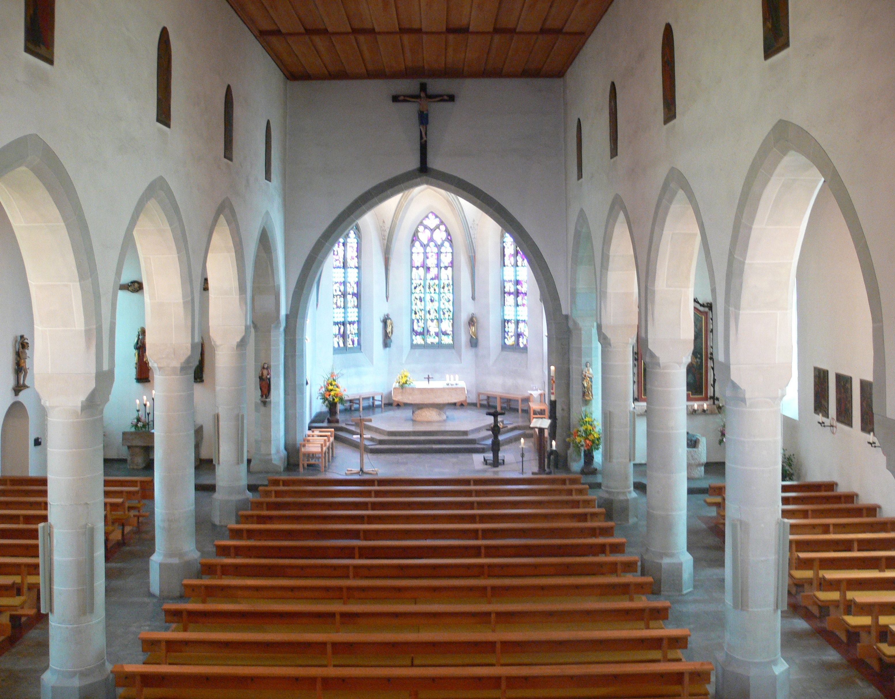 Pfarrkirche St. Peter und Paul, 88276 Berg Hauptschiff